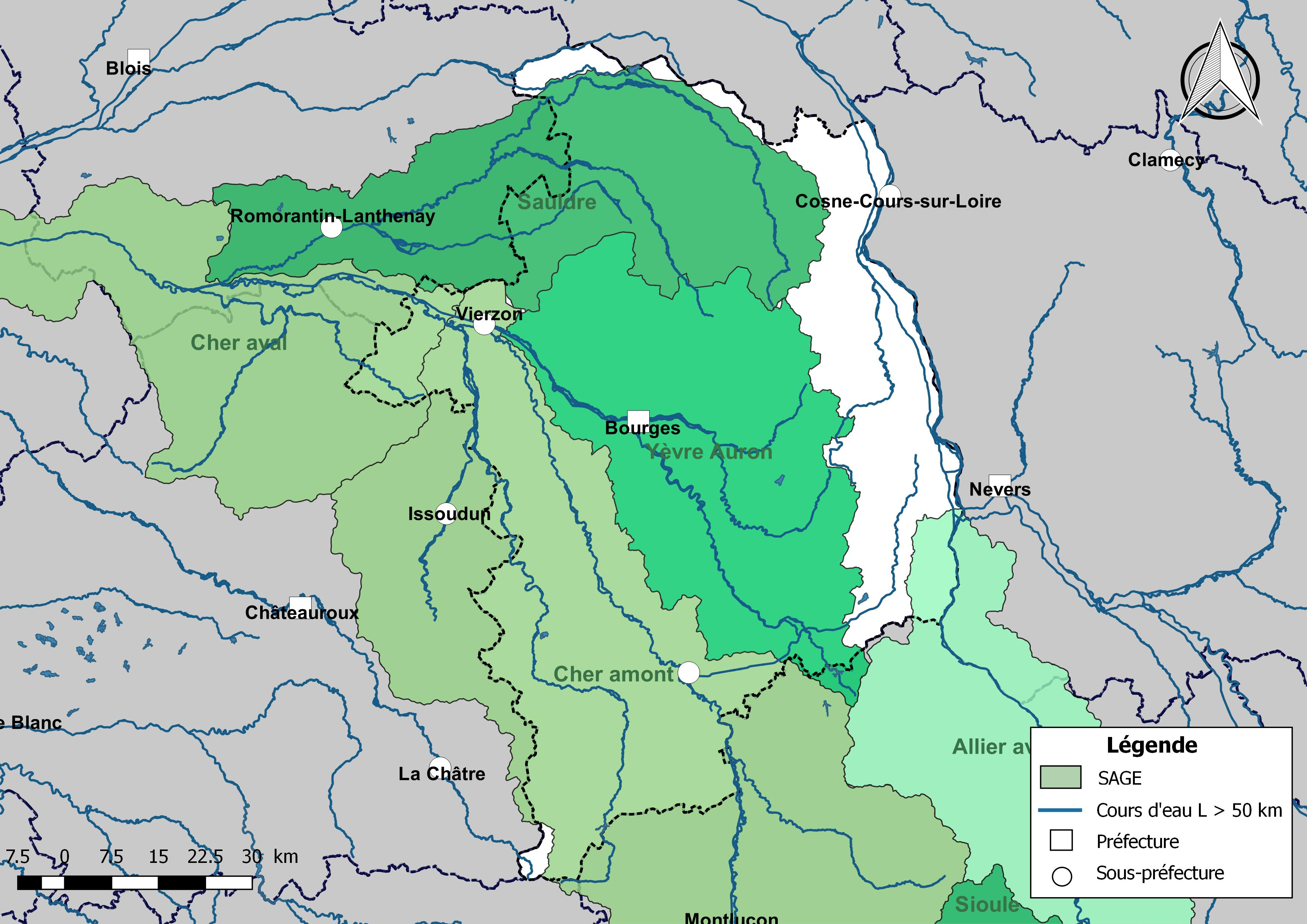 Carte des schémas d'aménagement et de gestion des eaux (SAGE) concernant le département du Cher (France) au 1er janvier 2018.